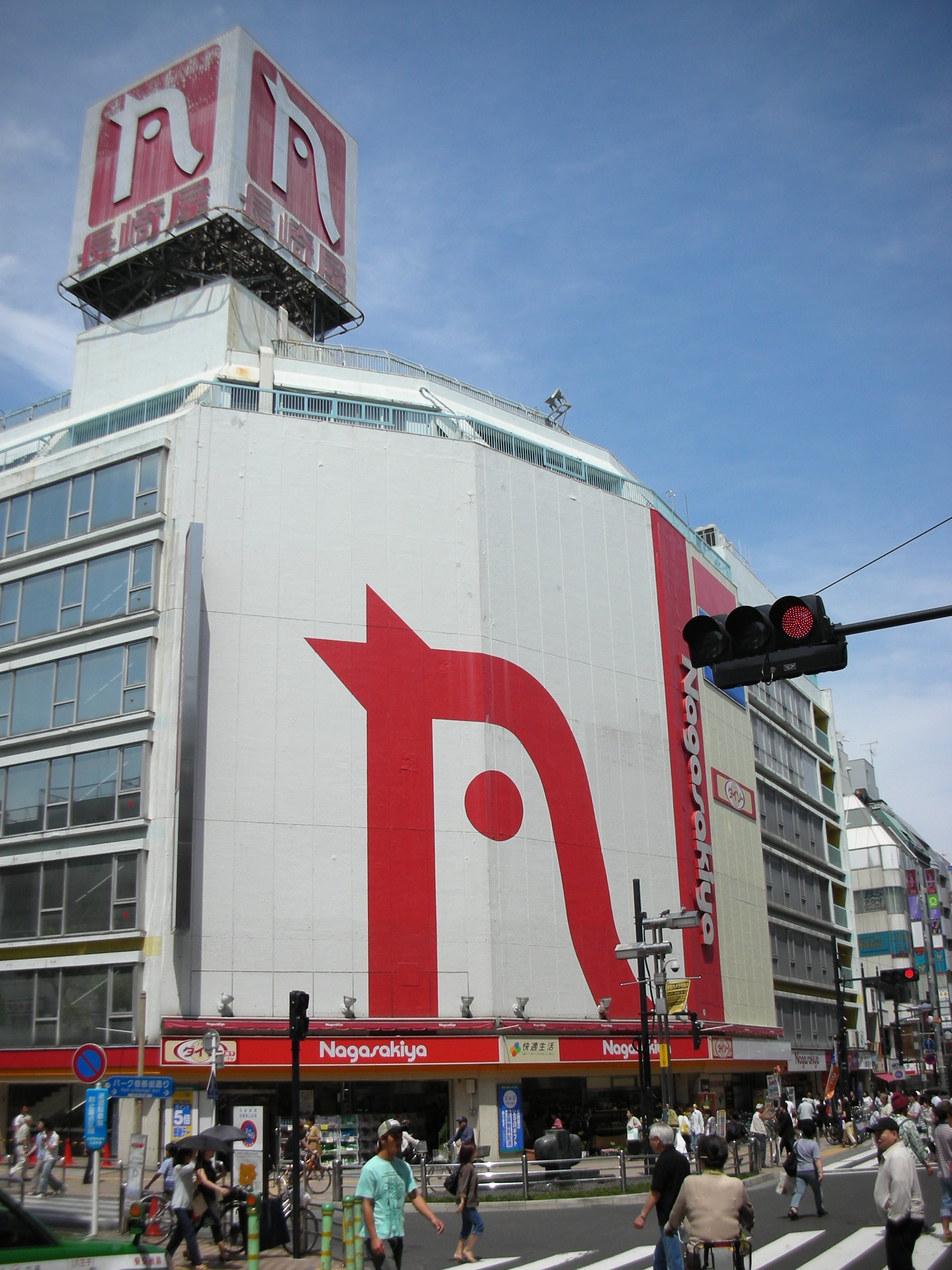 長崎屋八王子店の外観